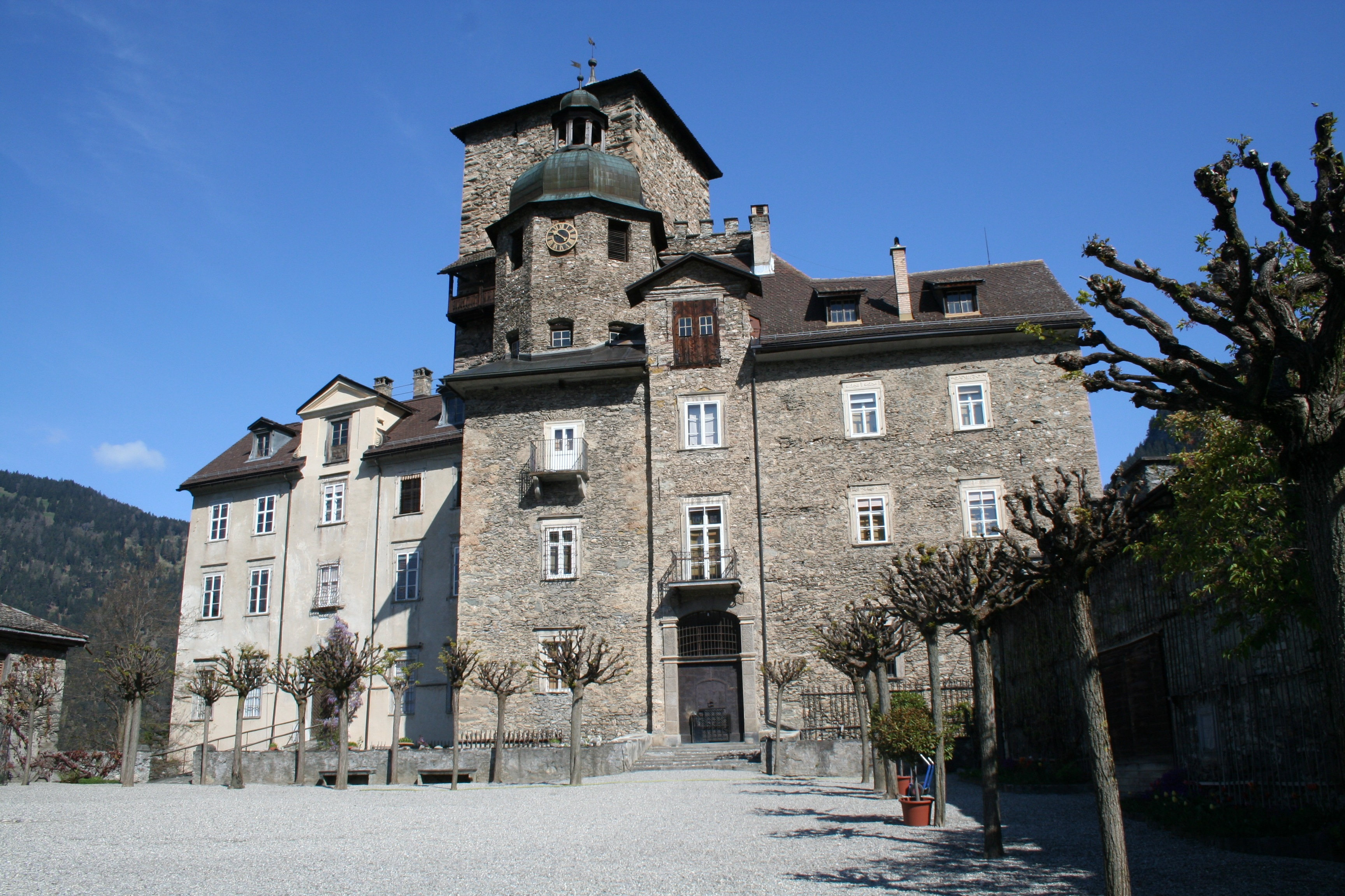 Schloss Ortenstein Hof